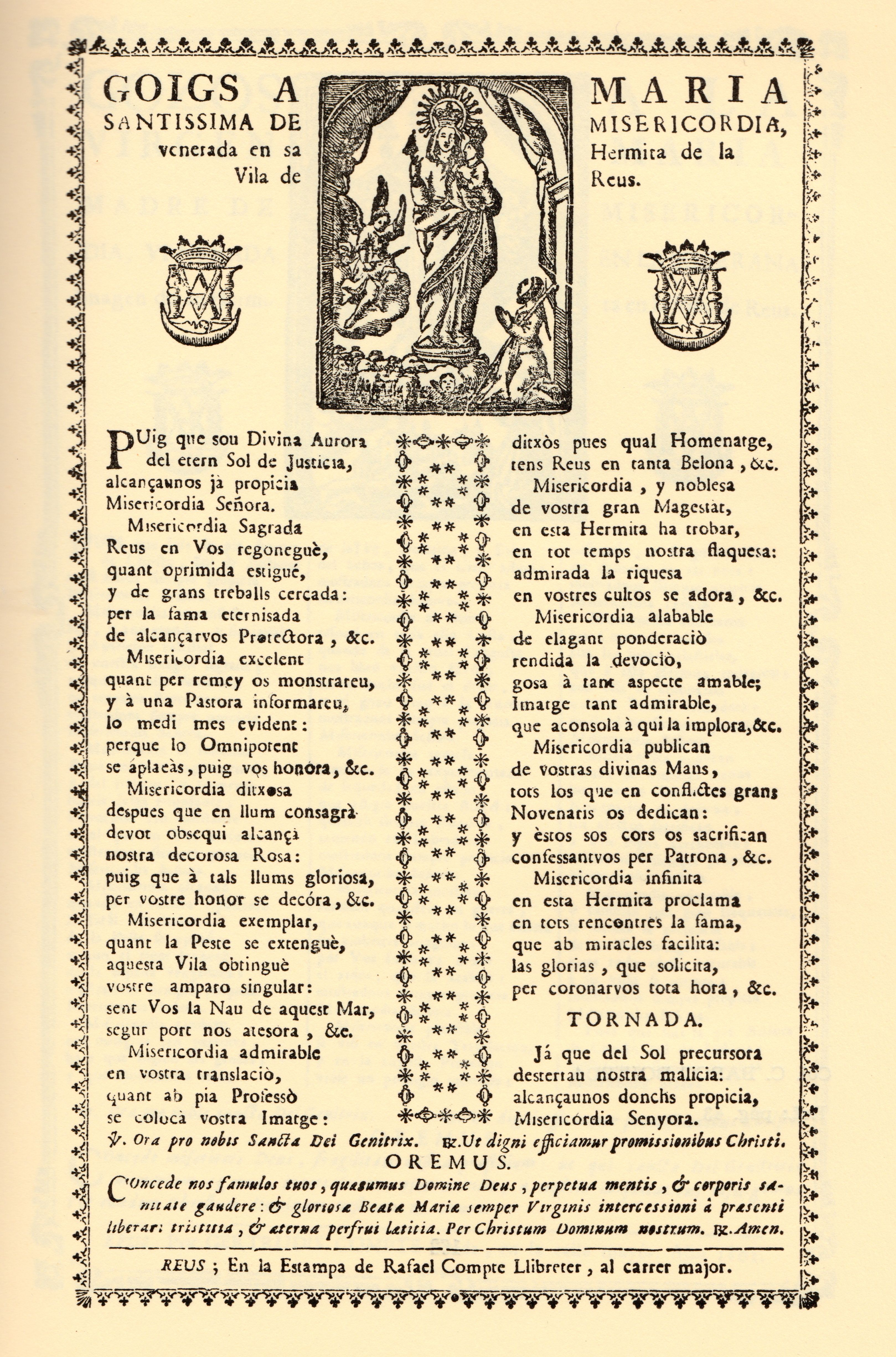 Goigs de la Mare de Déu de Misericòrdia impresos a Reus a finals del segle XVII per Rafael Compte